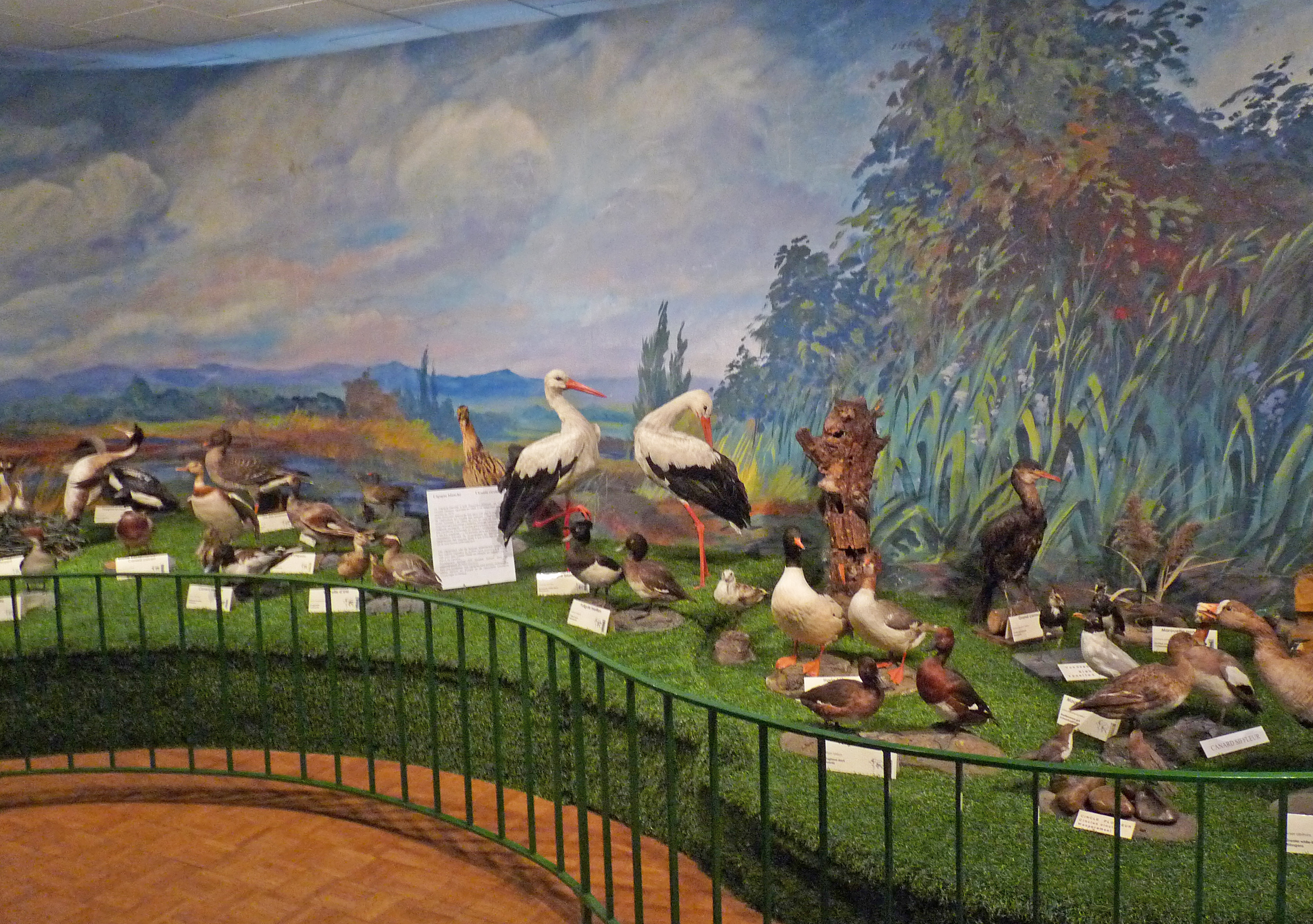 Oiseaux d'Alsace. Musée d'histoire naturelle et d'ethnographie de Colmar